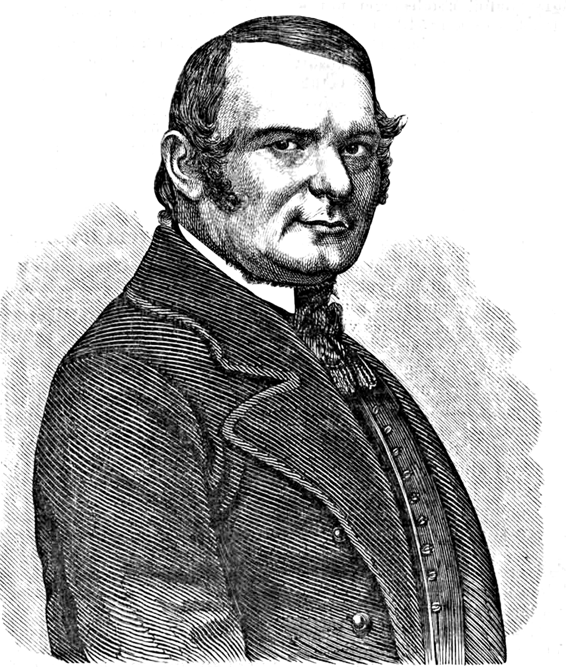 Rómer Flóris (1815–1889) régész, művészettörténész, festőművész, akadémikus, a magyar műemlékvédelem úttörője. (Vasárnapi Ujság, 1861. febrúár 3.)